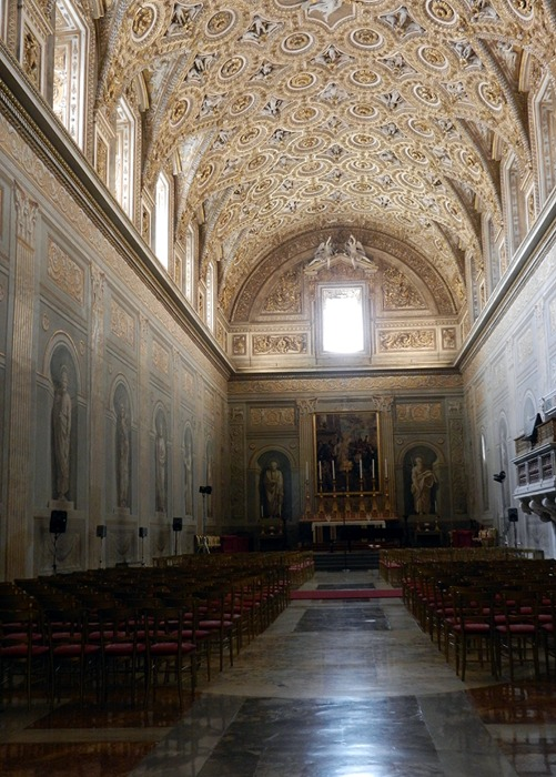 Roma - Cappella Paolina realizzata da Carlo Maderno nel Palazzo del Quirinale